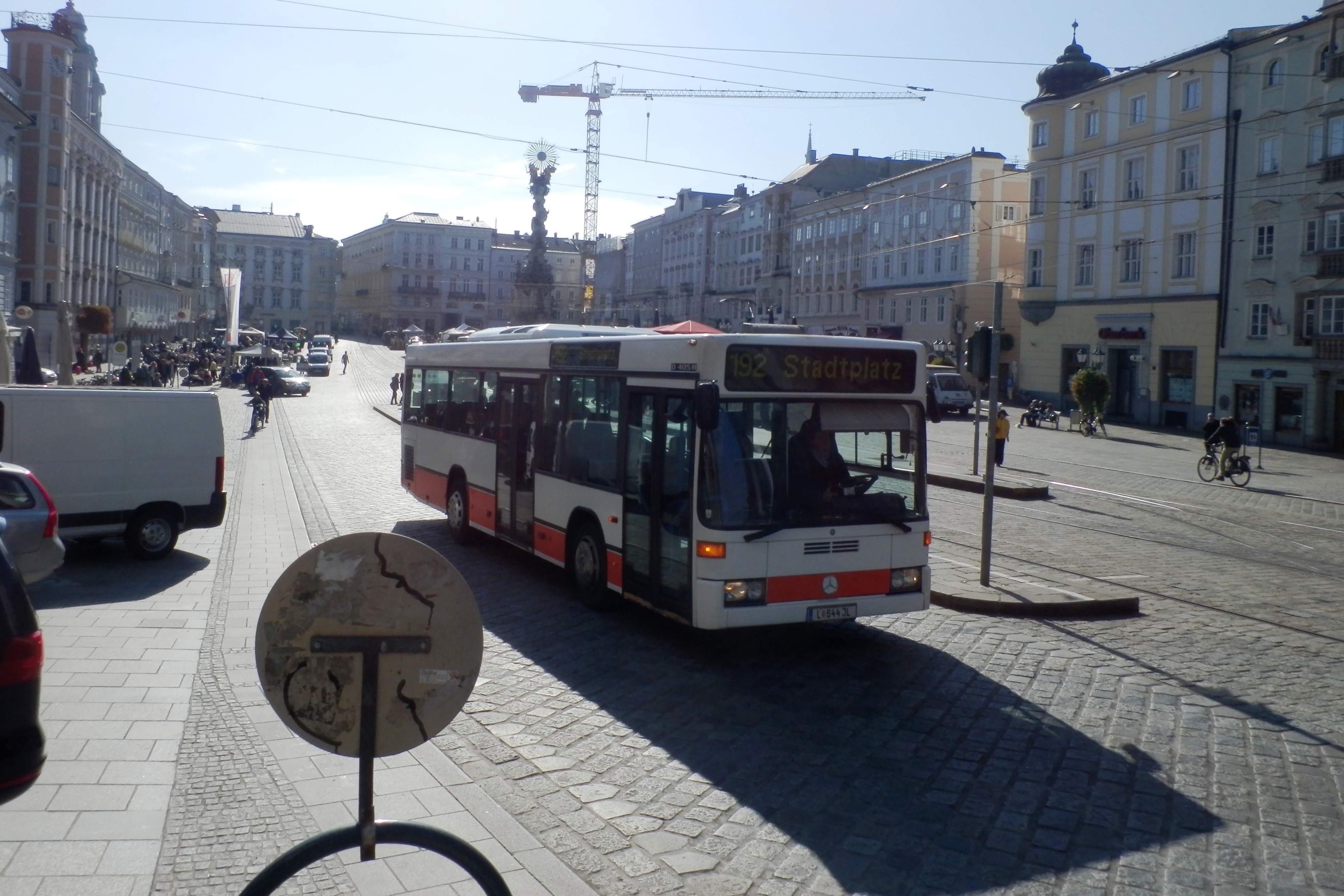 Sabtours/Linz AG Linien Midibus Linie 192 Richtung Stadtplatz Leonding, am Linzer Hauptplatz